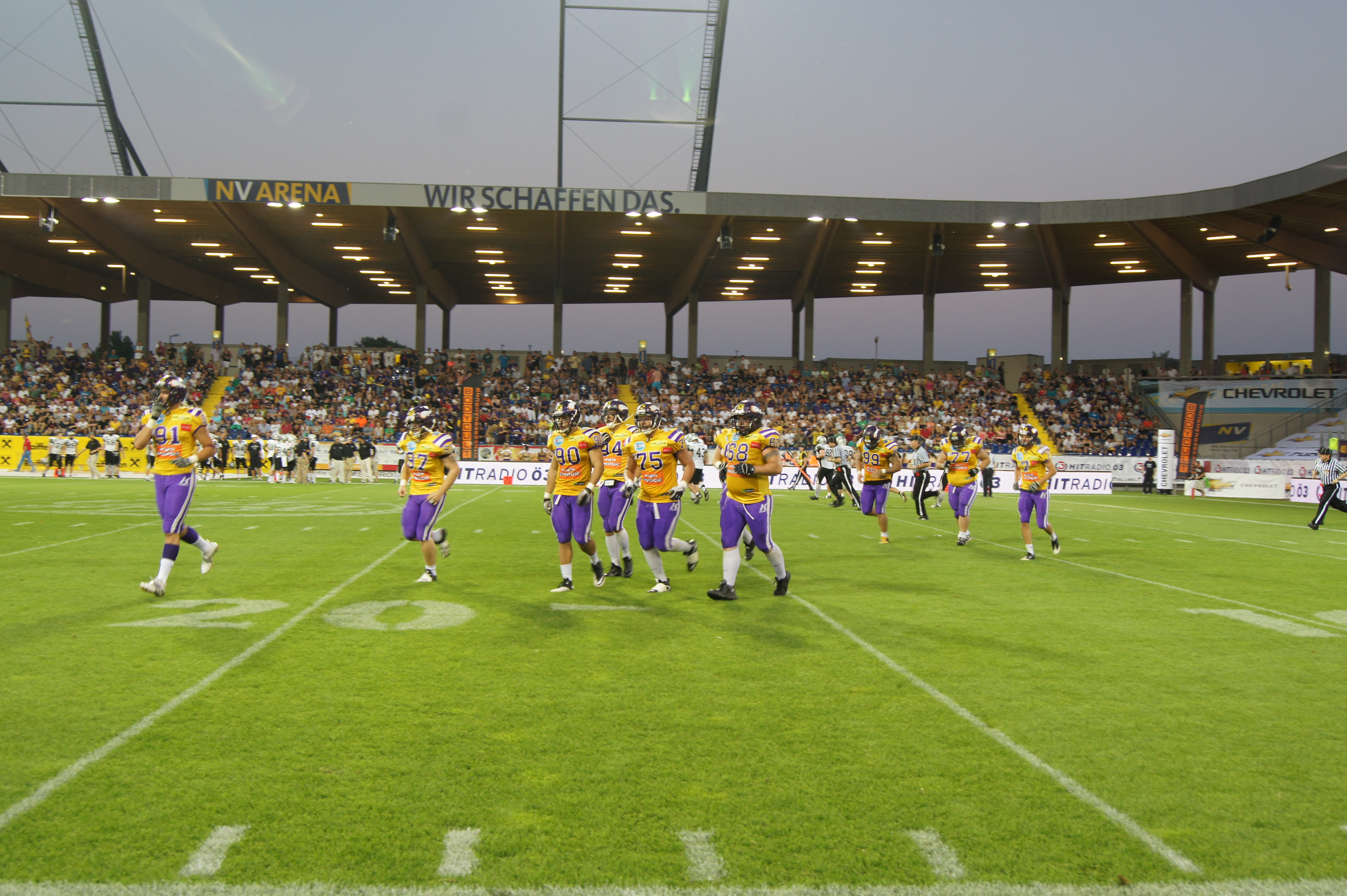 Austrian Bowl XXIX in der NV Arena in St. Pölten